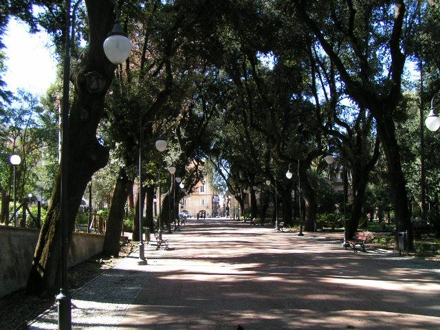 INTERNO DELLA "VILLA VECCHIA", GIARDINO PUBBLICO COMUNALE SITO NEL CENTRO STORICO DI COSENZA